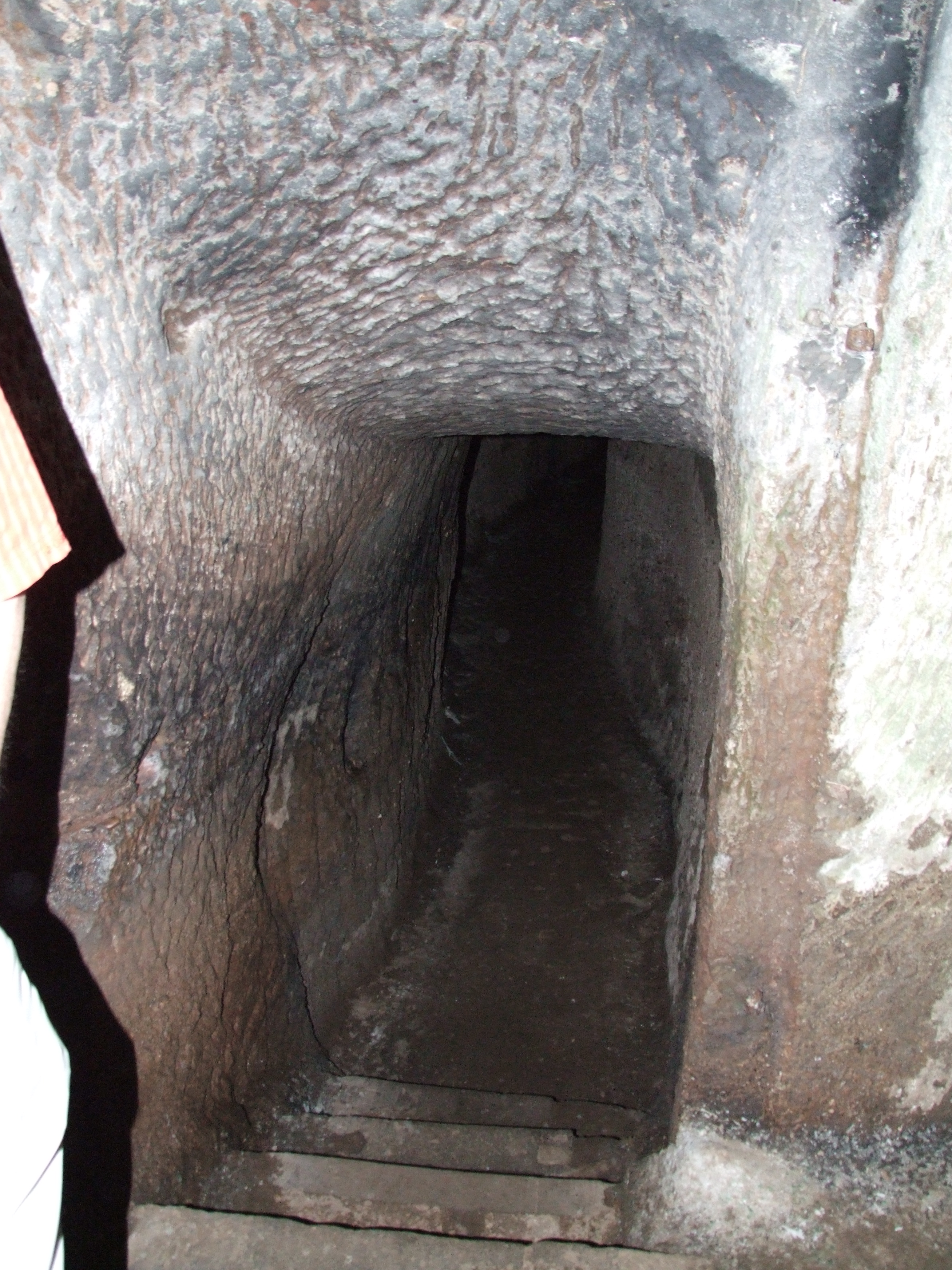 unterirdischer Gang der Burg Berwartstein